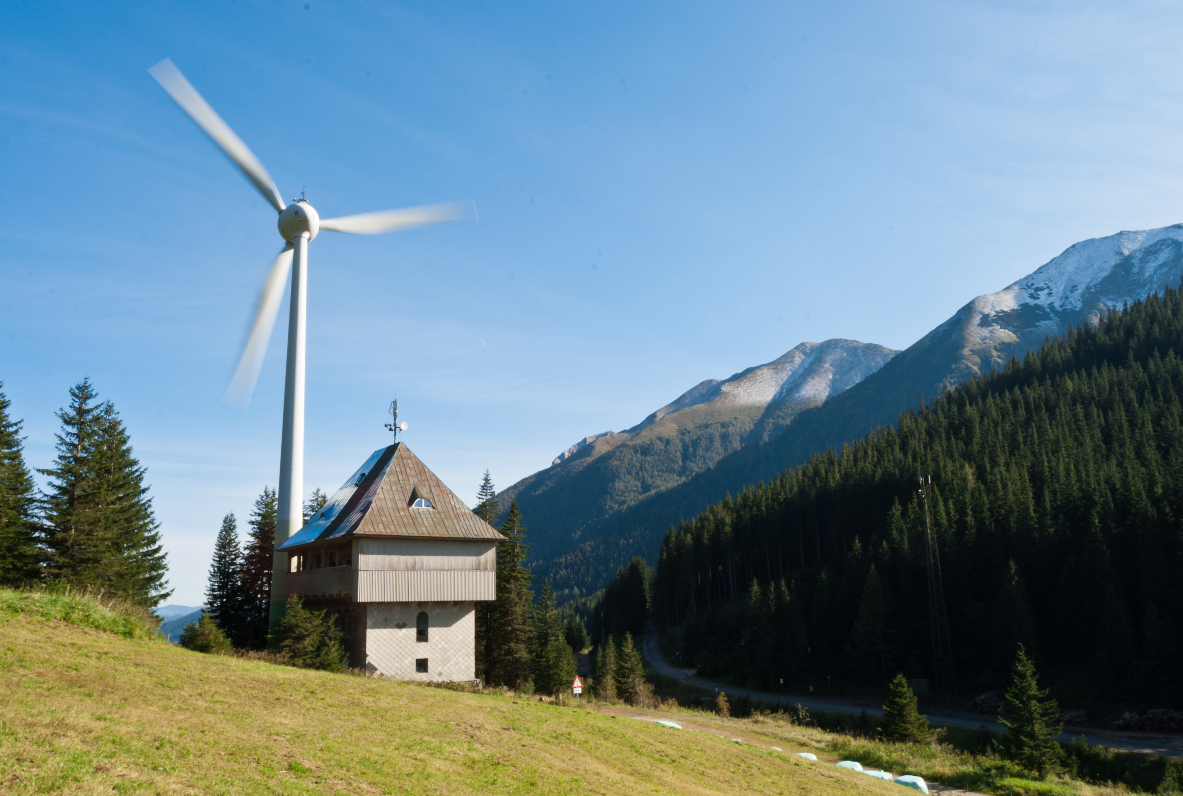 Umspannwerk am Präbichl, Blick Richtung Süden zu Vordernberger Mauern und Vordernberger Zinken (rechts)